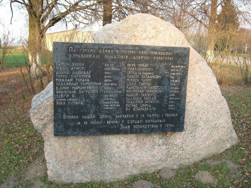 Мясата. Помнік Віленскаму тракту